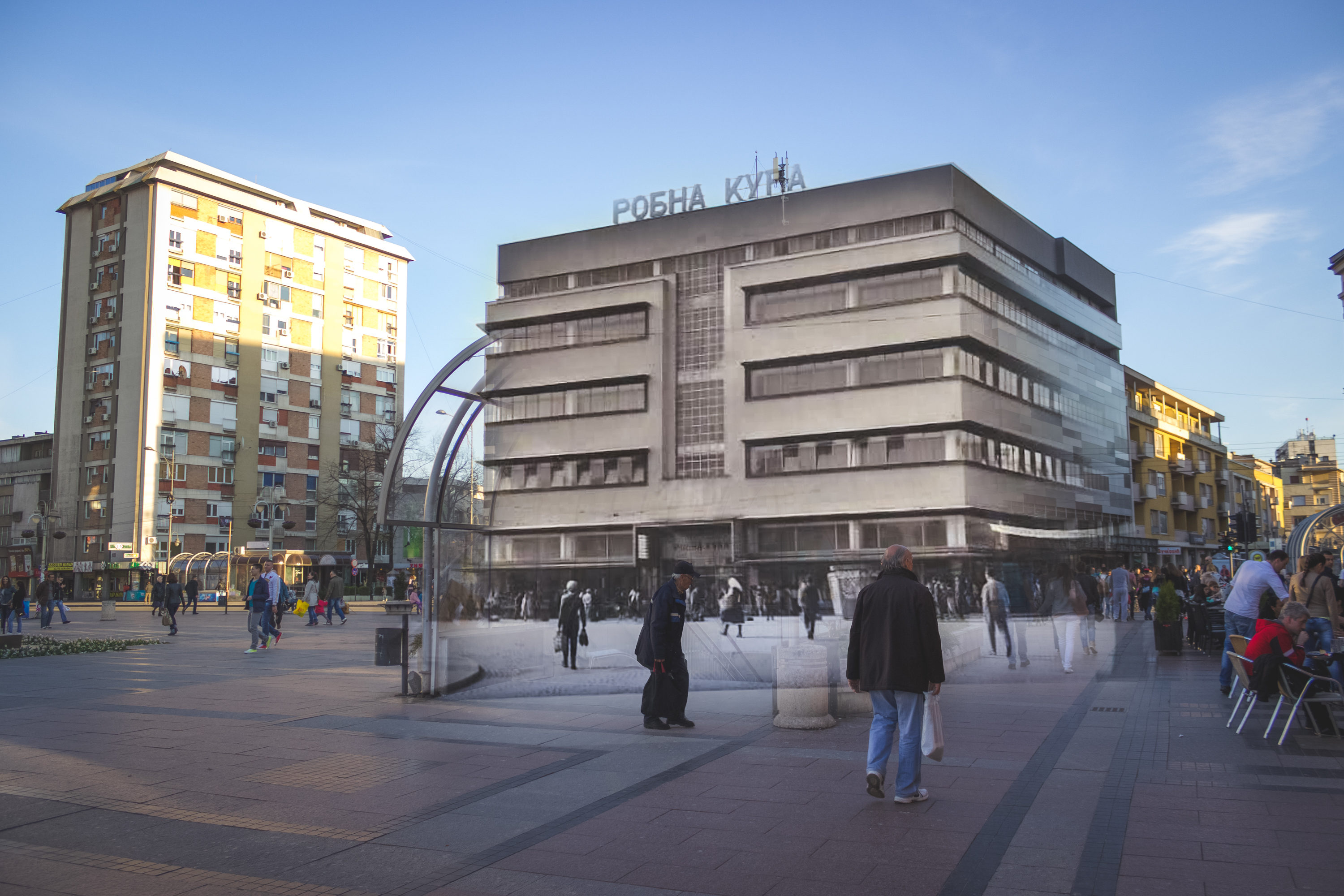 Srpski (latinica): Robna kuća Beograd